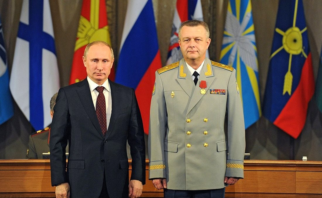 Командующий Войсками воздушно-космической обороны Александр Головко награждён медалью ордена «За заслуги перед Отечеством» I степени